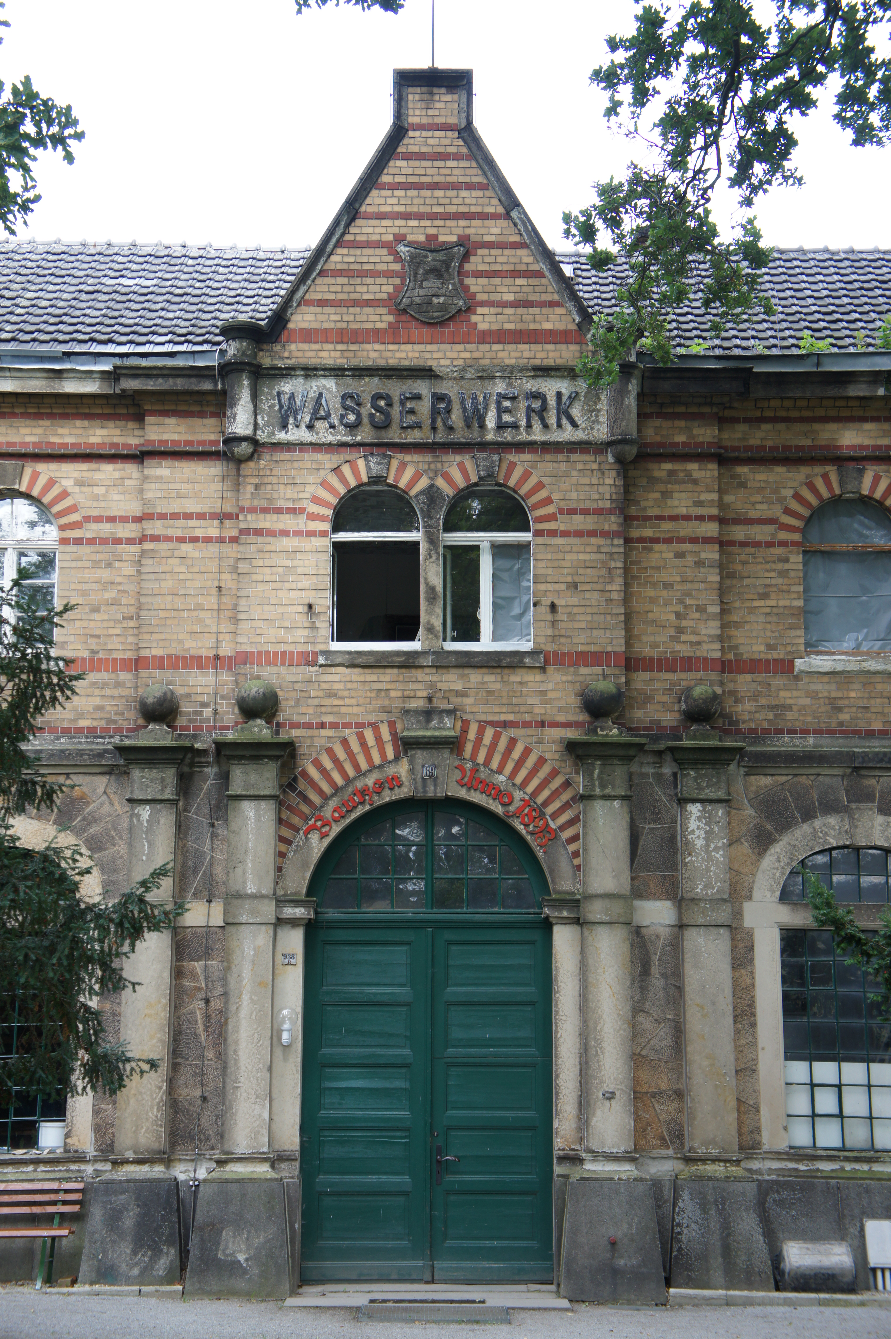 Ehemaliges Wasserwerk in Bautzen Strehla, erbaut um 1893, heute technisches Baudenkmal.